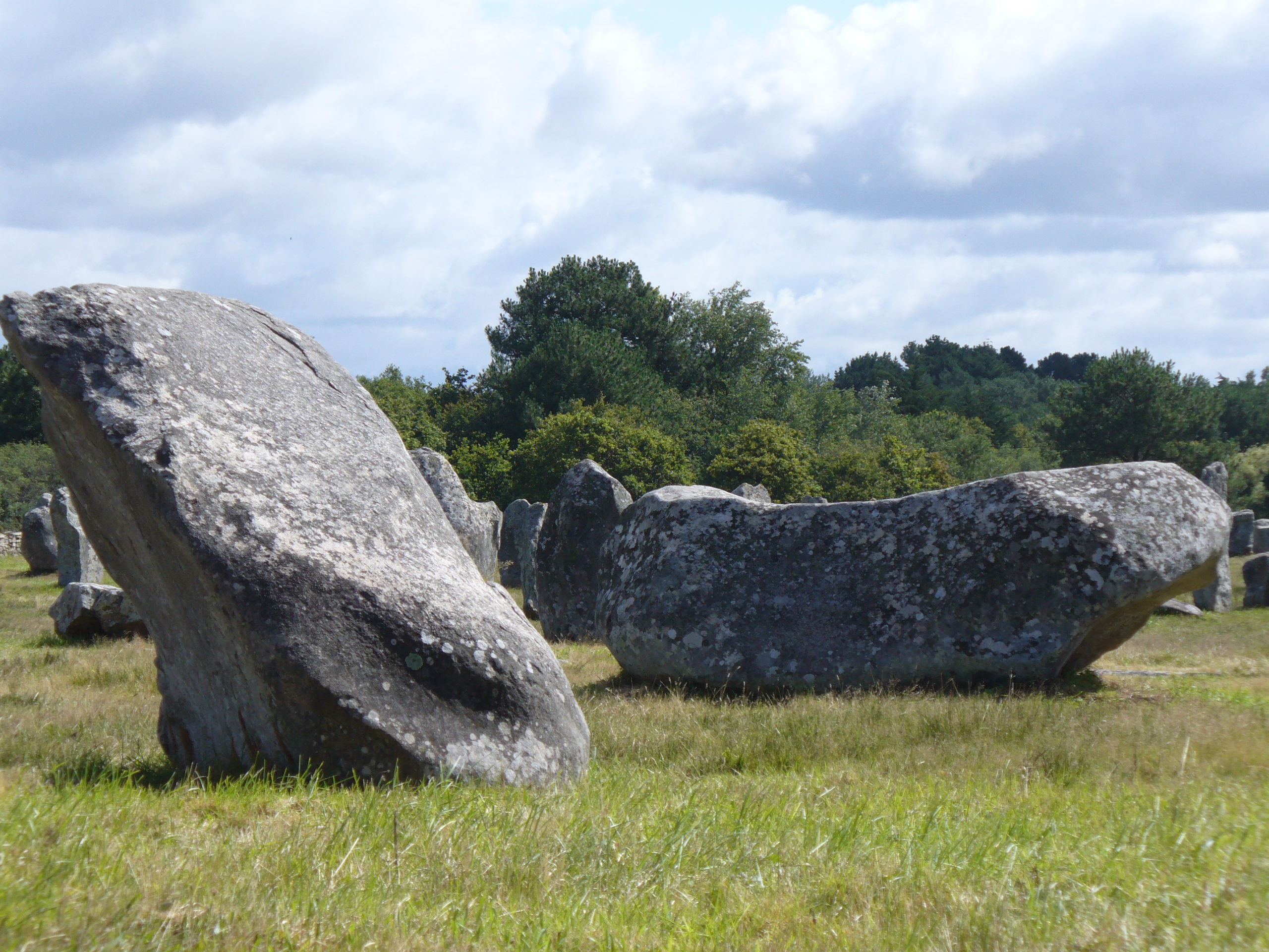 1099 Menhire,bis zu 4 Meter hoch,von Ost nach West in 1167 Meter Langen Alignements(Steinreihen) in einem Halbkreis(Cromlechs) endend. (Jungsteinzeit, Neolithikum ,Neolithic ,Néolithique 4500-2300 v.Chr.) Megalithanlage von Le Ménec, Carnac ,Departement Morbihan ,Bretagne